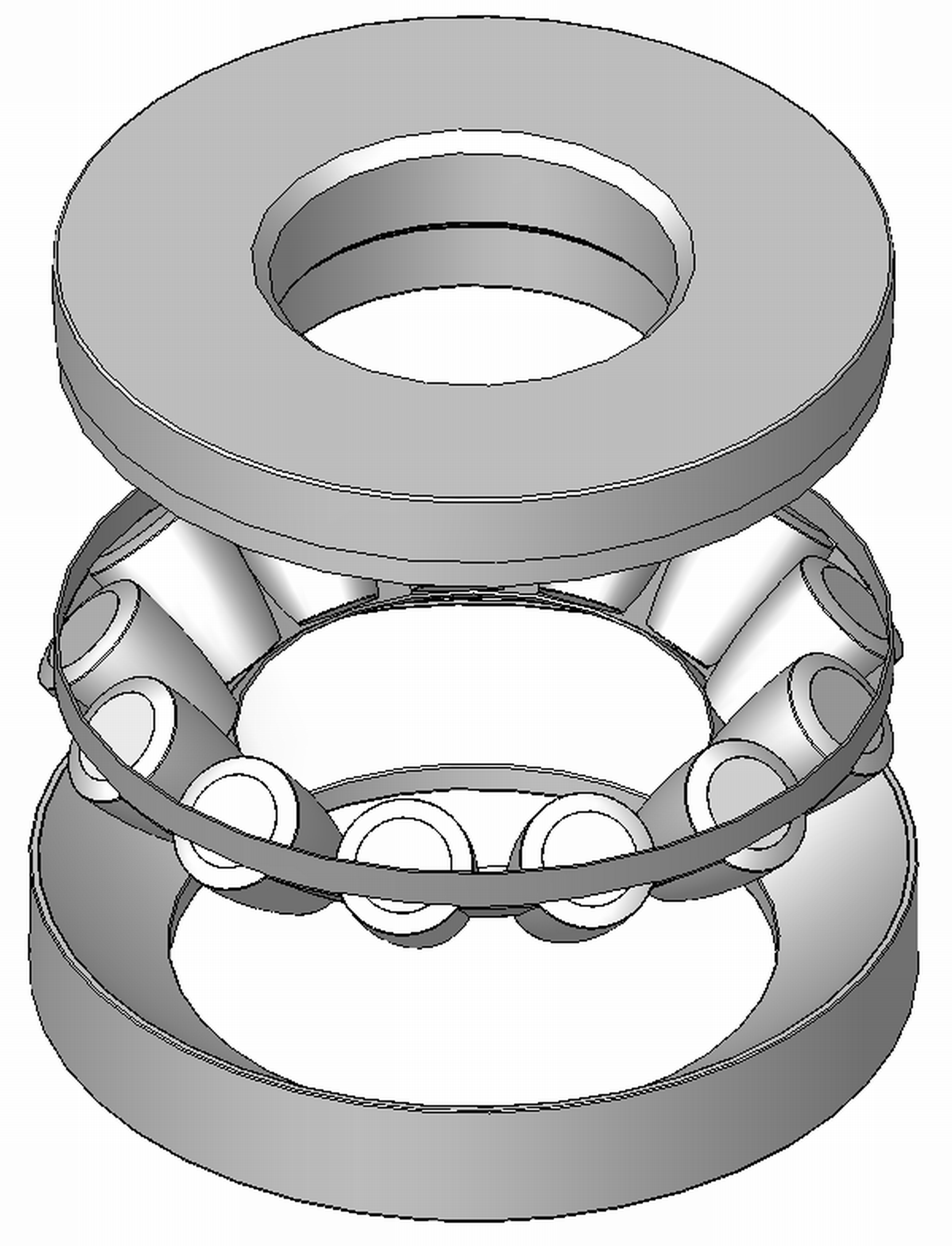 Axialpendelrollenlager, zerlegbar, Blechkaefig aus Stahl, Explosionsdarstellung, Hinweis: Innenaufbau des Lagers (insbesondere des Kaefigs) variiert je nach Hersteller und Baugroesse rolling contact bearings